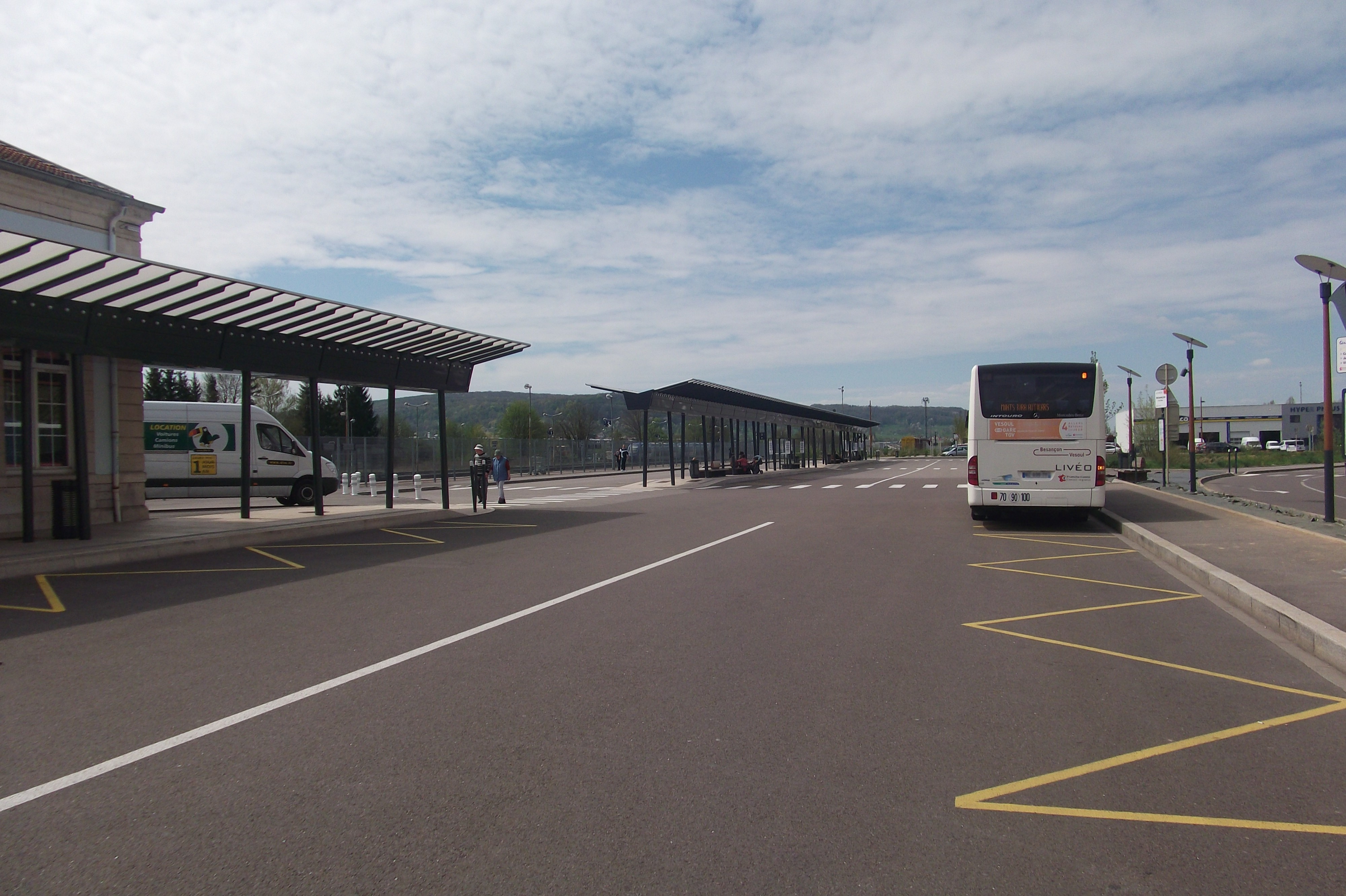 Le gare multimodale de Vesoul (Haute-Saône, Franche-Comté)